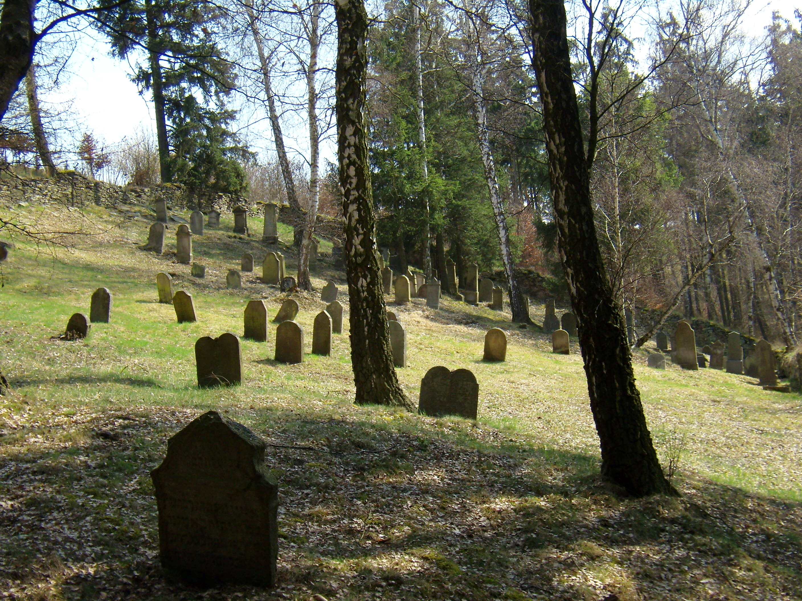 Ošelín ŽH 03